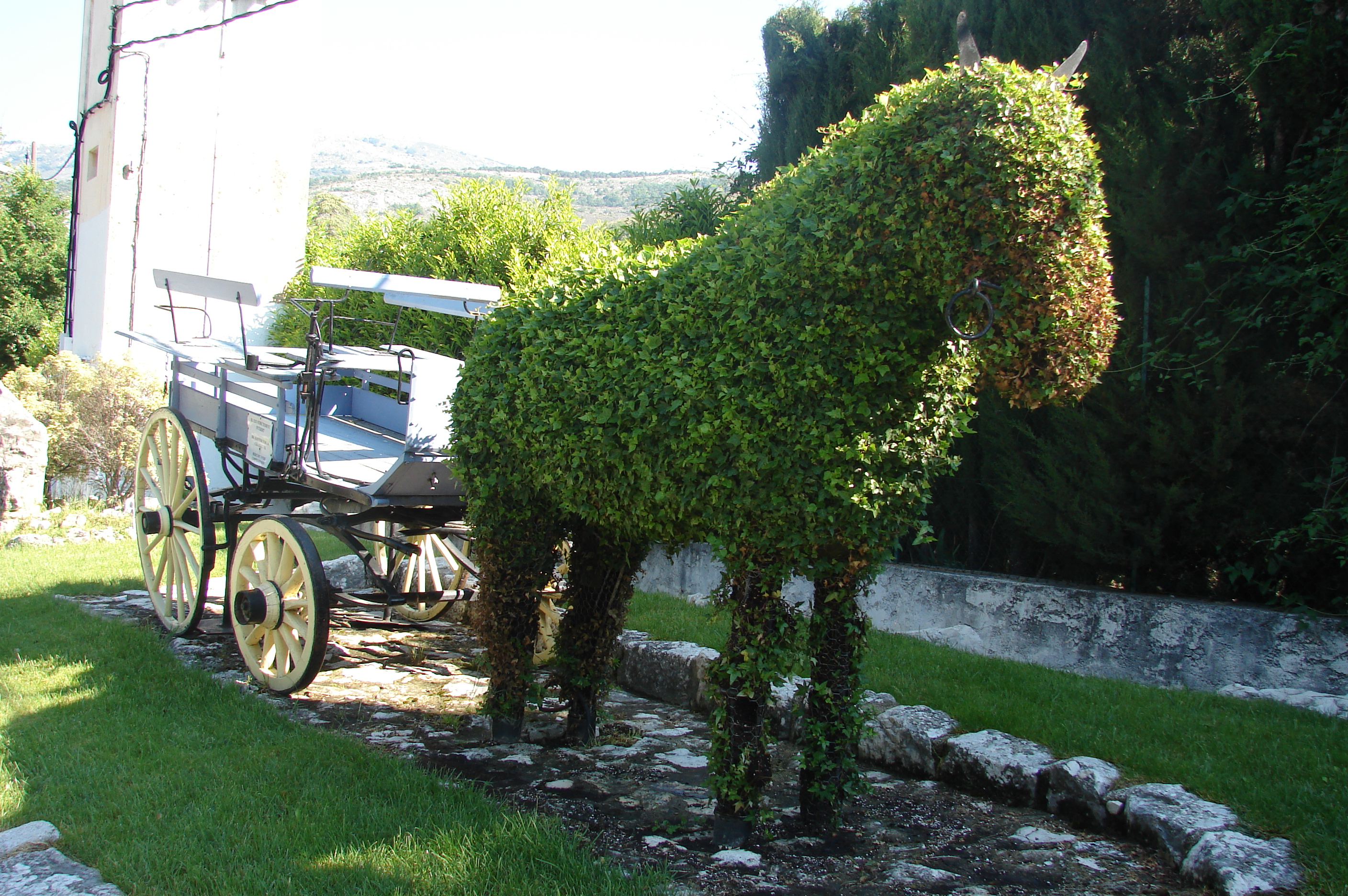 Saint Vallier de Thiey